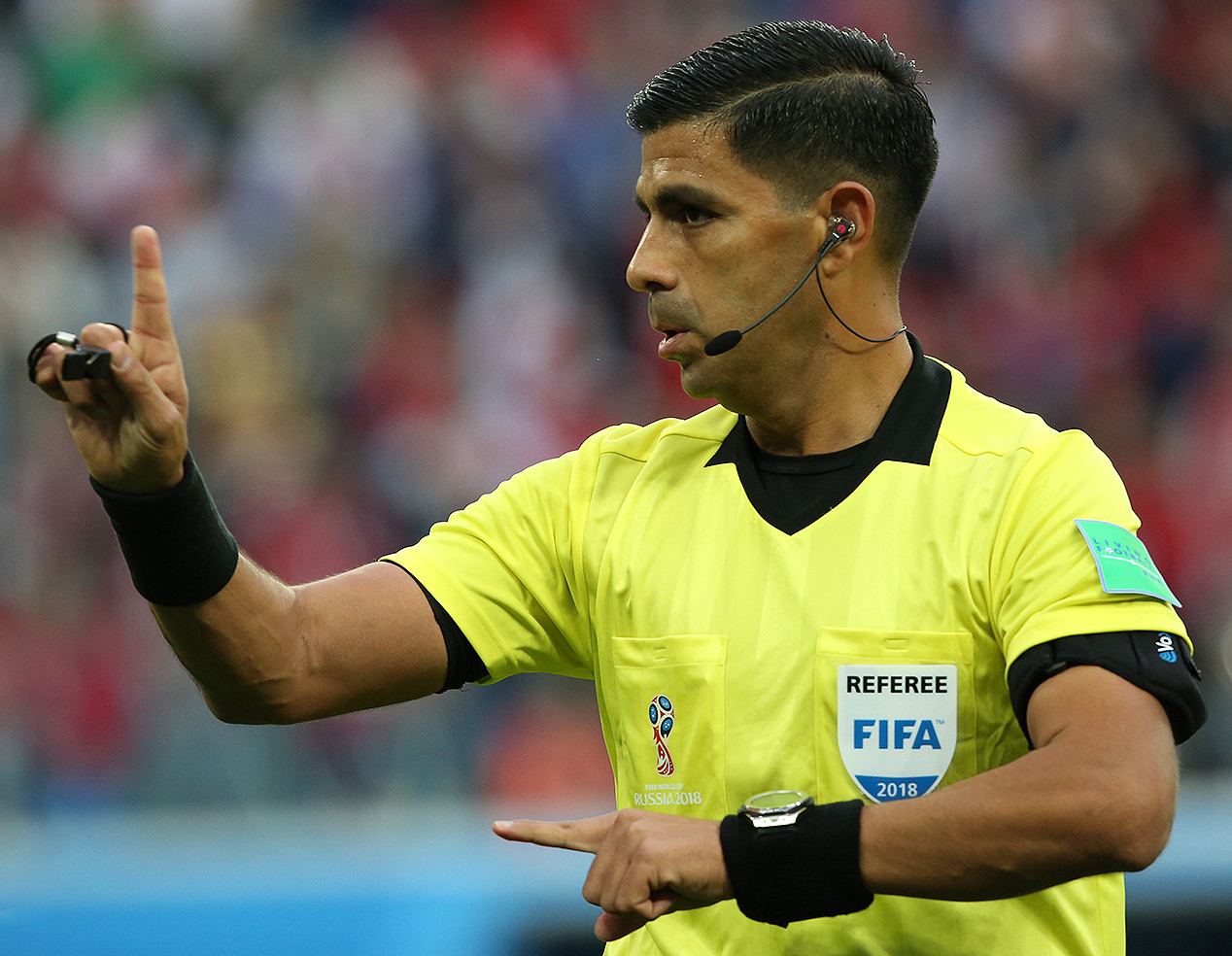 Историческая победа сборной России в матче с Египтом!